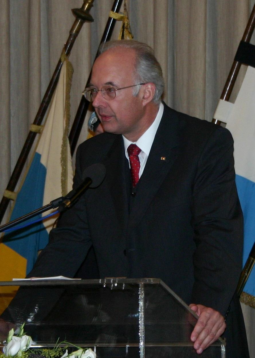 Paul Kirchhof bei einer Festrede